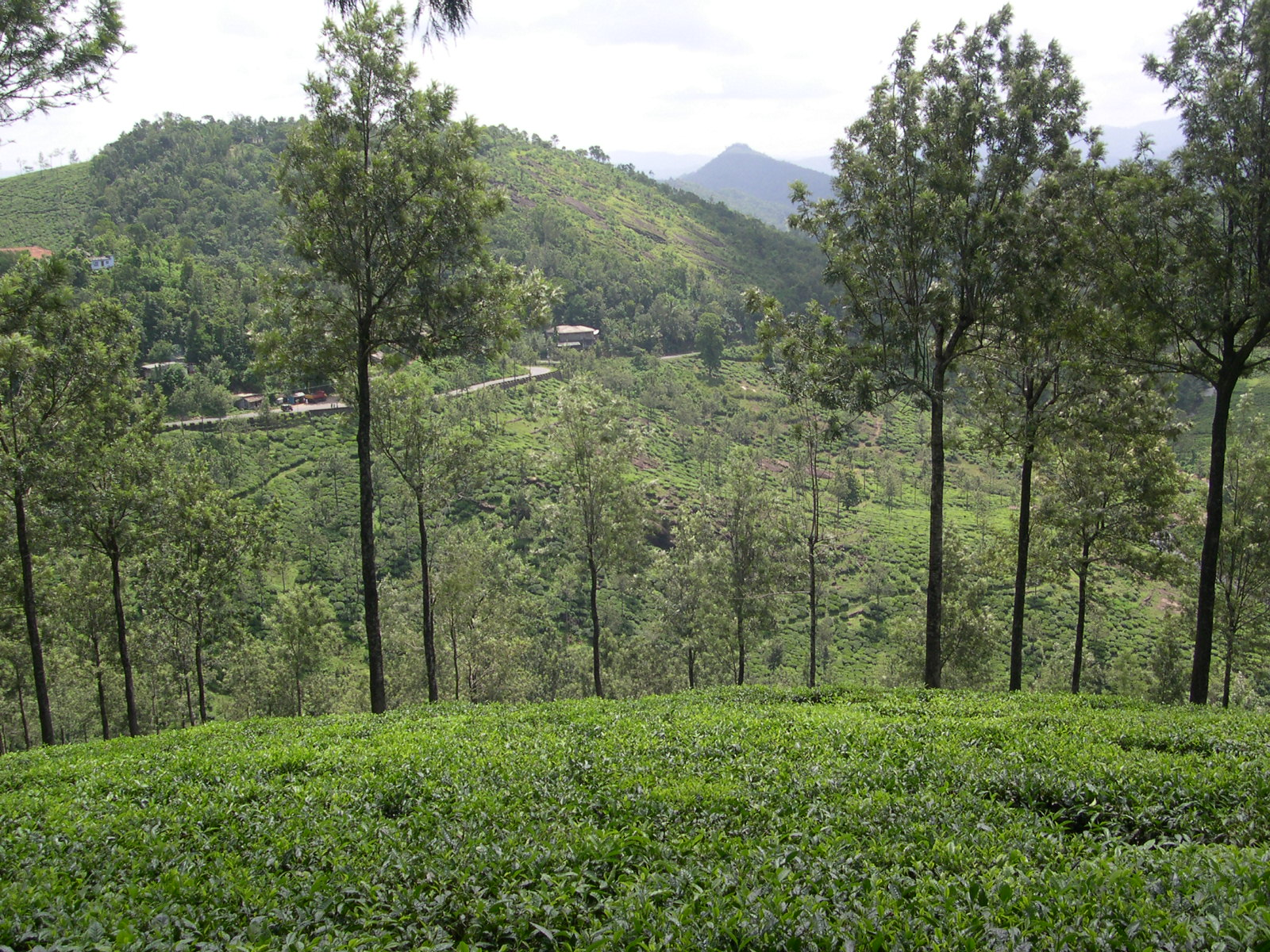 Tea Garden at Kuttikkanam, Idukki district of Kerala, India.